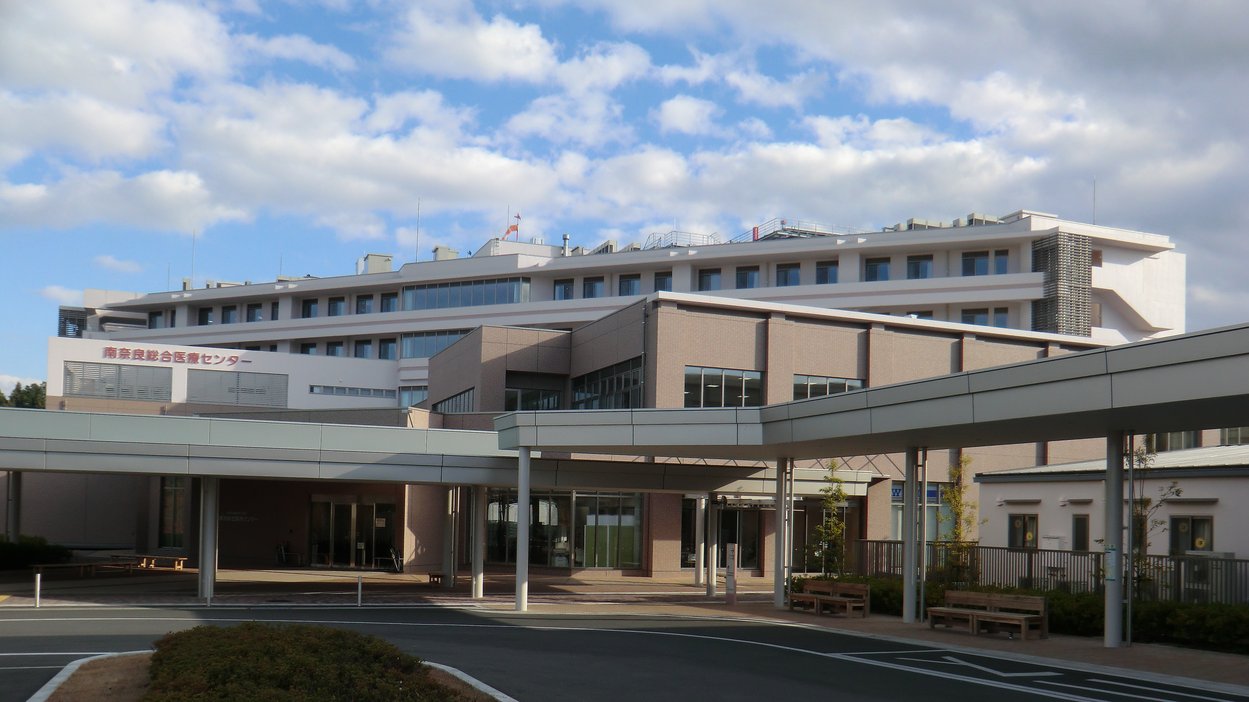 南和広域医療企業団南奈良総合医療センター (2016年12月撮影)